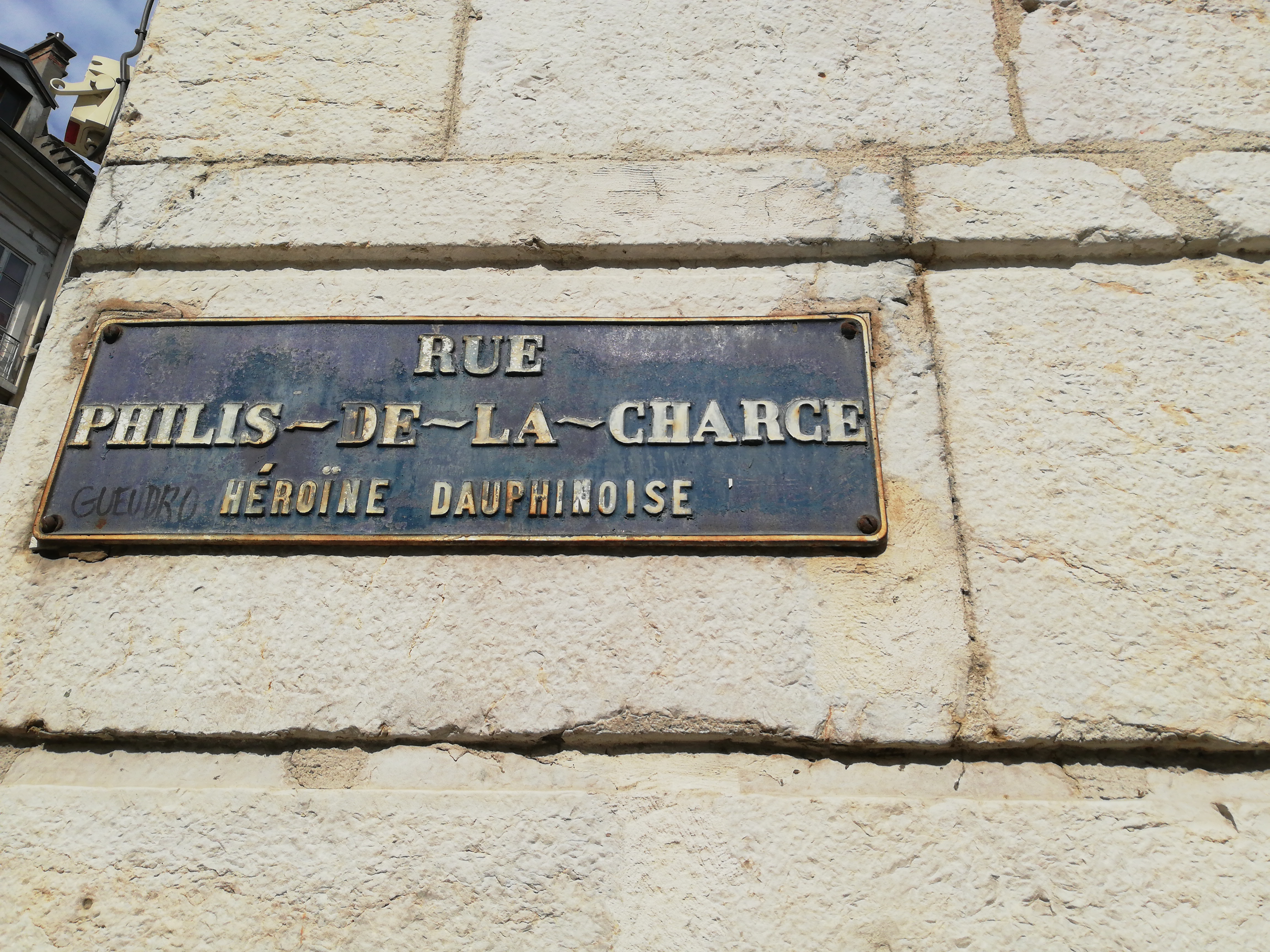 Plaque de la rue Philis de la Charce à Grenoble.